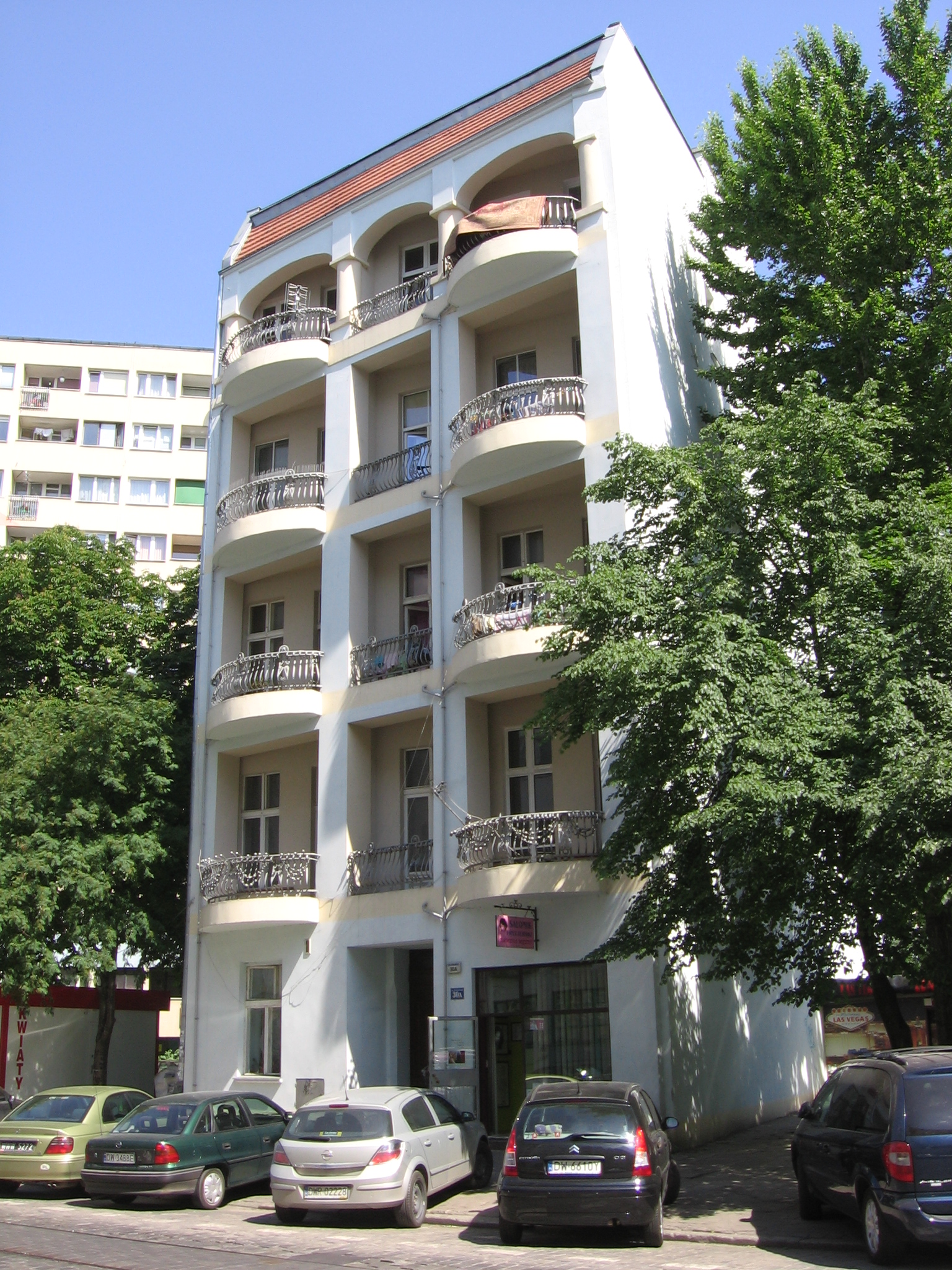 secesyjna kamienica przy ul. Zielińskiego 30a we Wrocławiu, w głębi widoczne najwyższe piętra wielkopłytowego bloku przy Zielińskiego 22-36